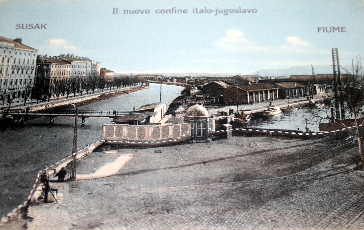 Rijeka, Granični most na Rječini 1925. godine